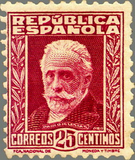 Segell de 1931 amb la imatge del polític socialista espanyol, Pablo Iglesias (1850-1925).